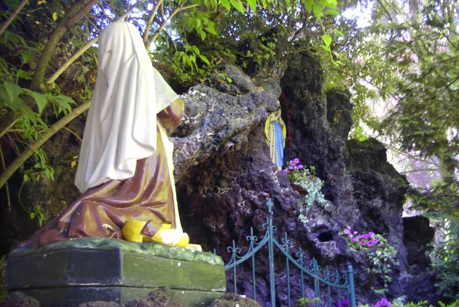 Summary Bildbeschreibung: "Lourdes-Grotte", Erkelenz-Borschemich Quelle: eigenes Foto Fotograf/Zeichner: bodoklecksel 20:47, 14. Jun 2006 (CEST) Datum: Juni 2006 Sonstiges: ...